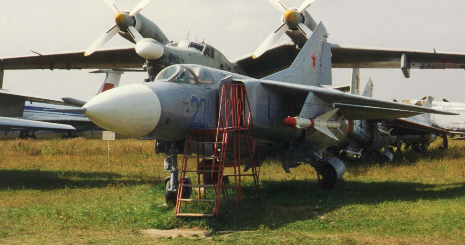 MiG-23 Vorserienmaschine, 1997 in Monino